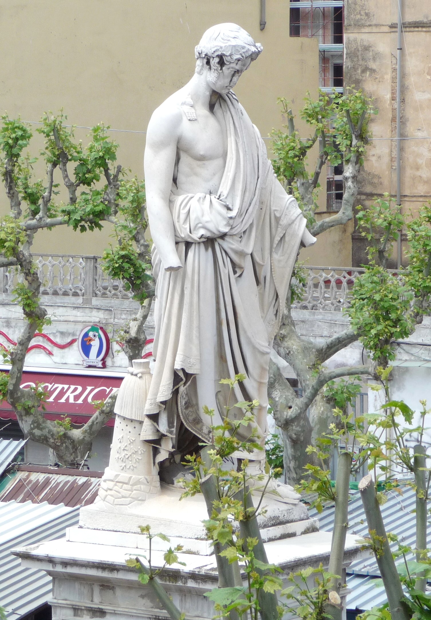 Monument for Leopoldo II, Piazza XX Settembre, Livorno, Italy